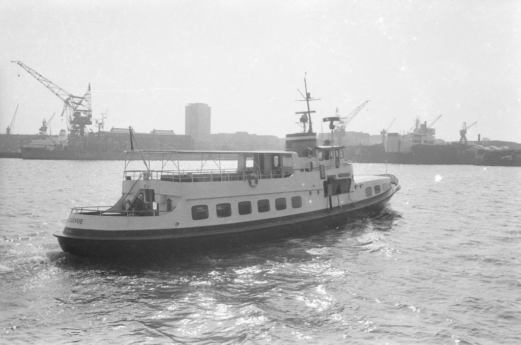 Fördedampfer BELLEVUE